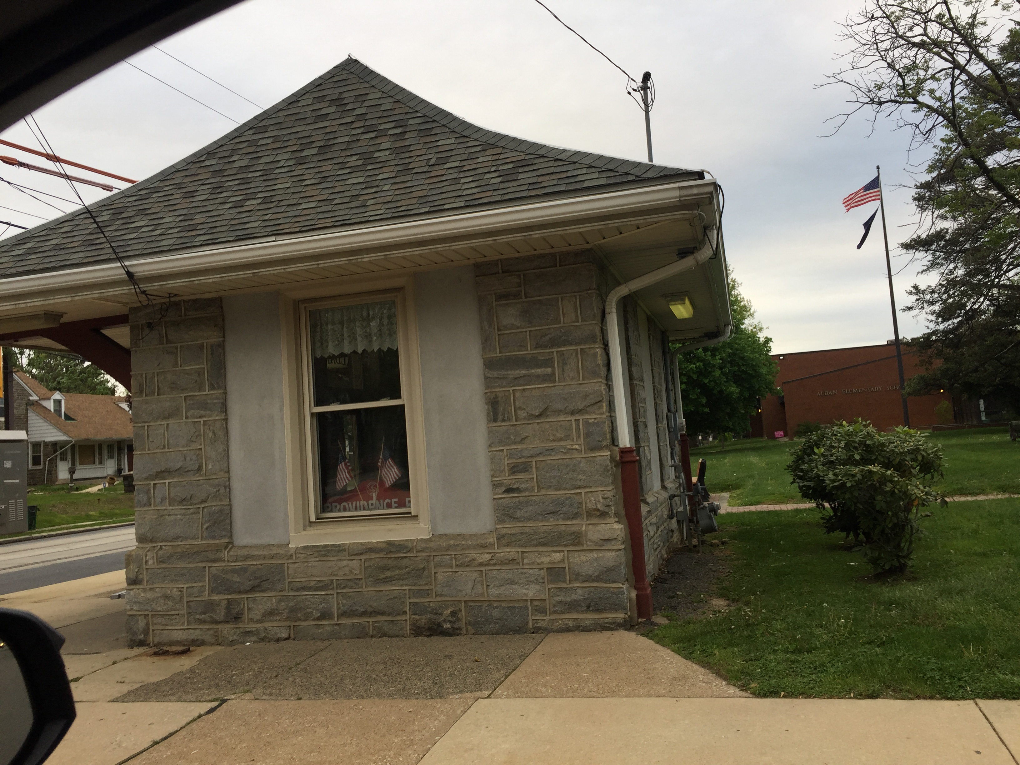 Providence avenue station